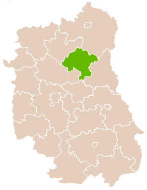 Map of Parczew county, Lublin voivodship Mapa powiatu parczewskiego, województwo lubelskie